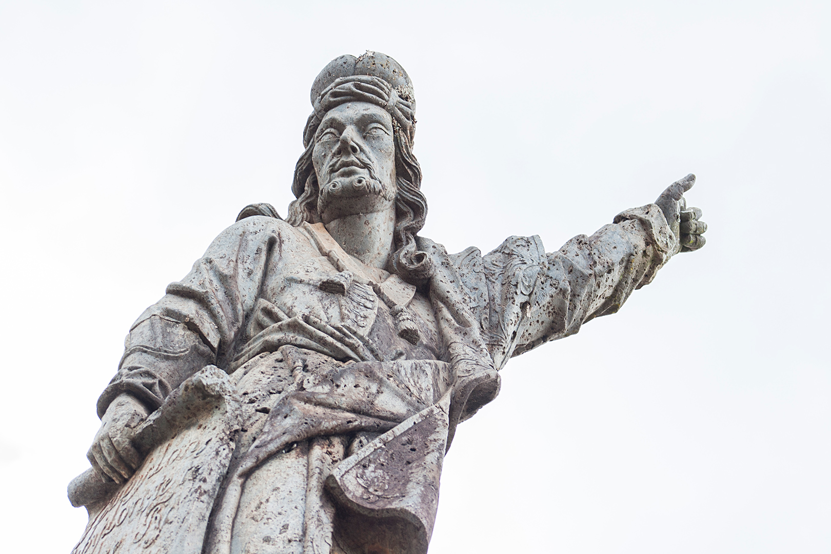 Santuário de Bom Jesus de Matozinhos: conjunto arquitetônico, paisagístico e escultórico